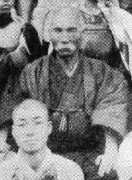 糸洲安恒(Itosu Anko, 1831 - 1915)